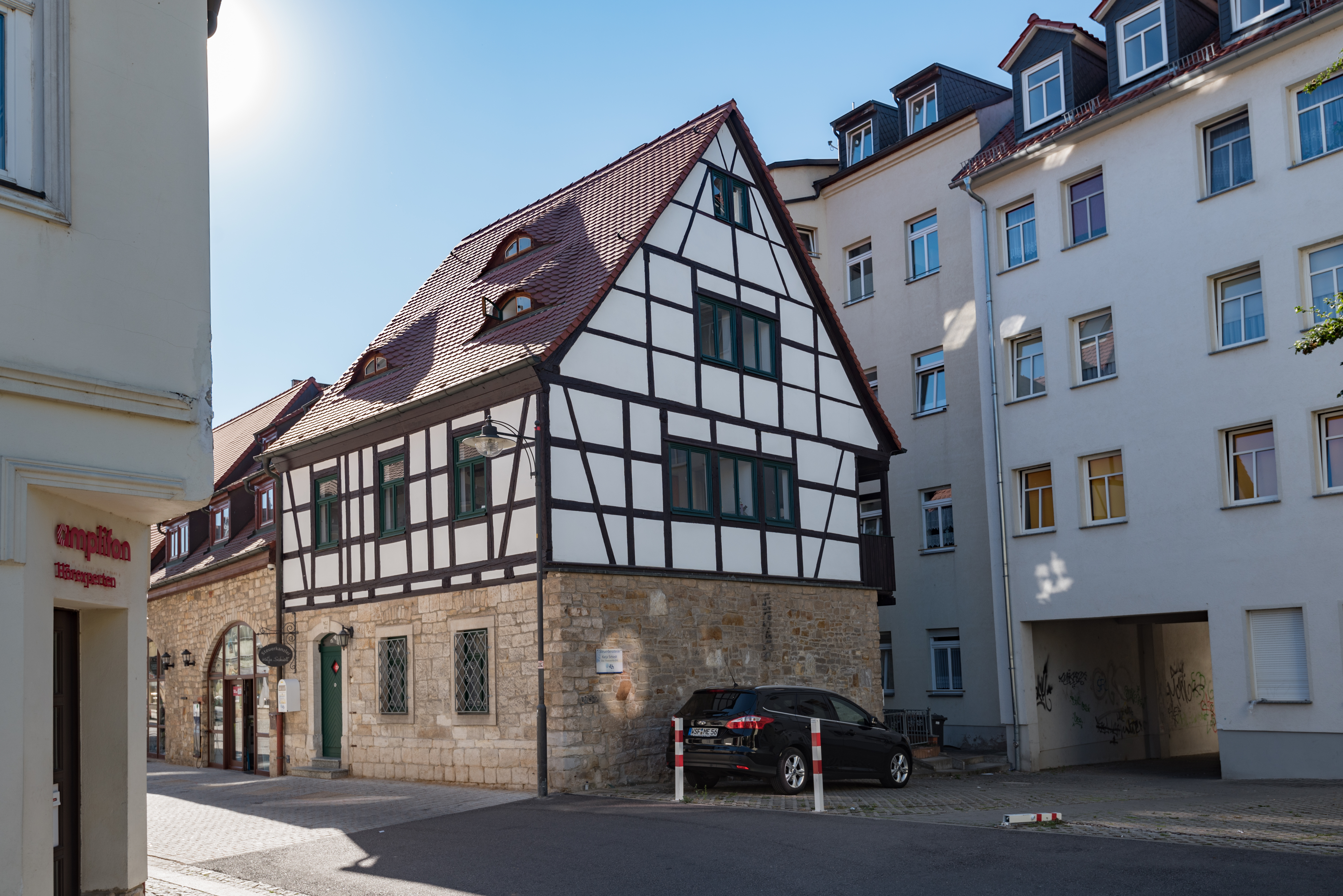 Weißenfels, Große Kalandstraße 3